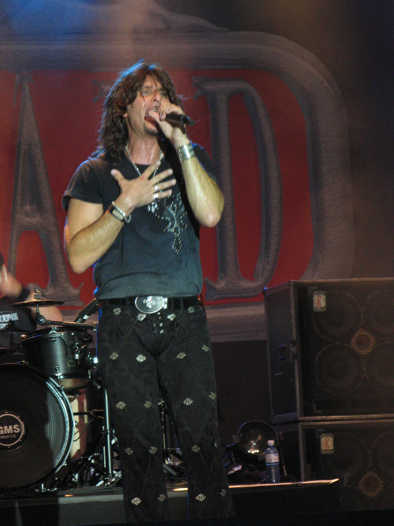 Steve Lee, Sänger von Gotthard. Aufgenommen am Radio Argovia Fäscht 2010 beim Flugplatz Birrfeld in Lupfig.